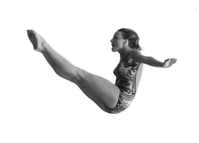 Heidi Becker ADN-ZB Lehmann 31.5.75-str- Berlin: DDR-Meisterschaften der Wasserspringer- Mit Heidi Becker (SC Empor Rostock) setzte sich am 31.5. im Turmspringen eine der Favoritinnen auf den DDR-Meistertitel durch. Die Europameisterin 1970 im Kunstspringen wird sicherlich auch am letzten Tag der Meisterschaften in ihrer Spezialdisziplin ein gewichtiges Wort mitreden.